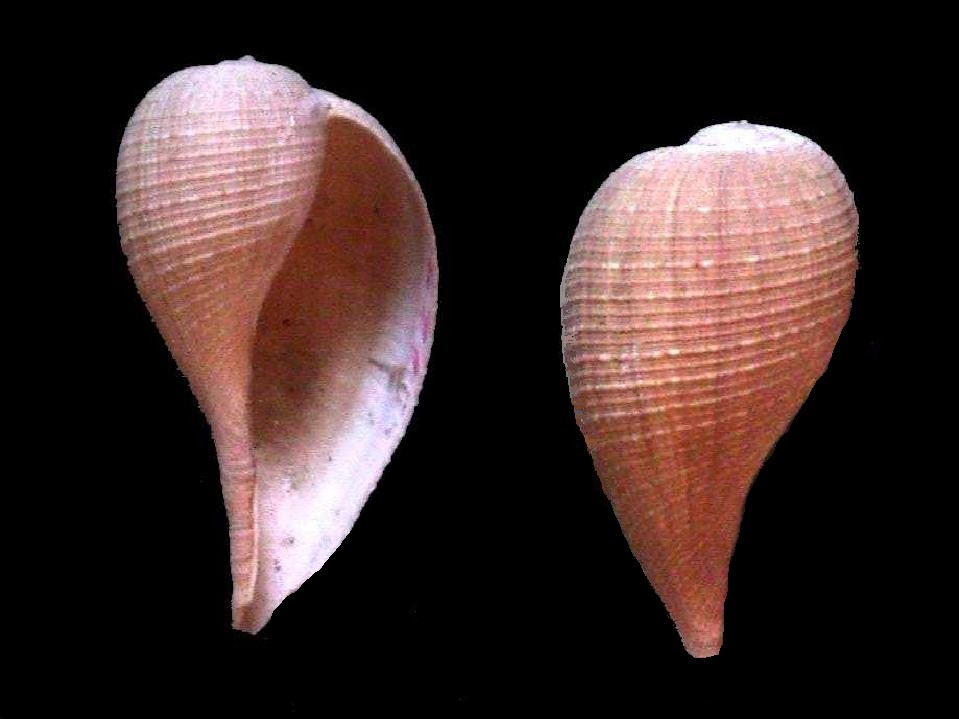 Ficus ficus (Linnaeus, 1758) sinonimo: Ficus comunis (Linnaeus, 1758)